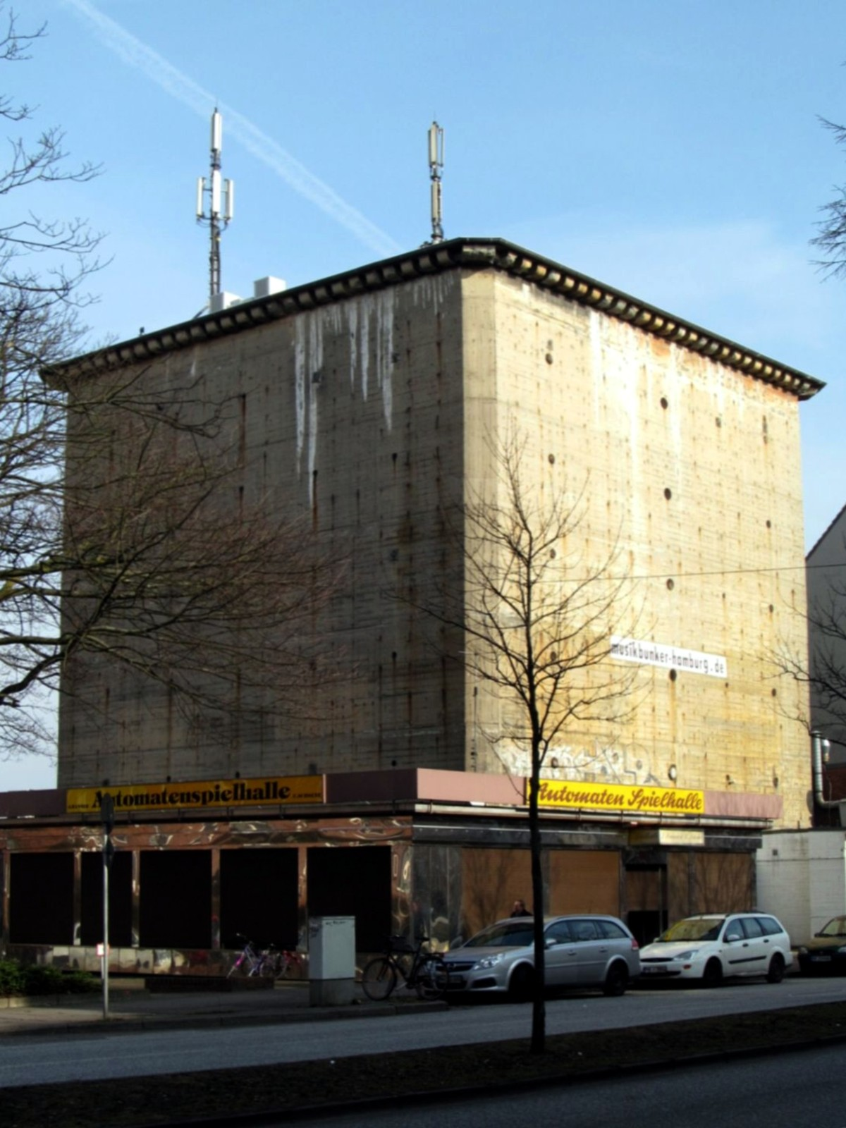 Hochbunker Sievekingdamm, Hamburg-Hamm, genutzt u.a. als Probenraum ("Musikbunker")